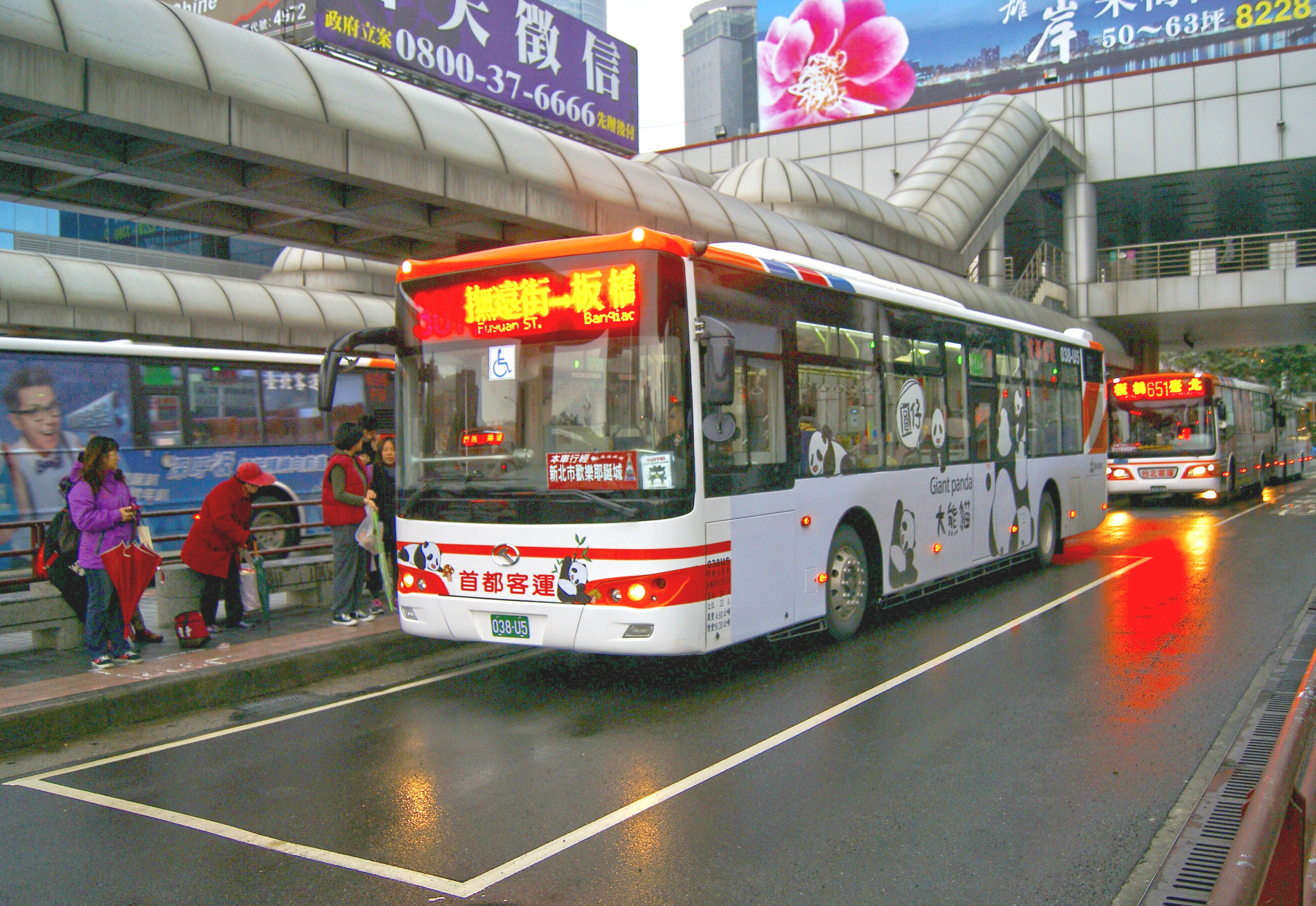 首都客運廈門金龍三門低地板公車038-U5